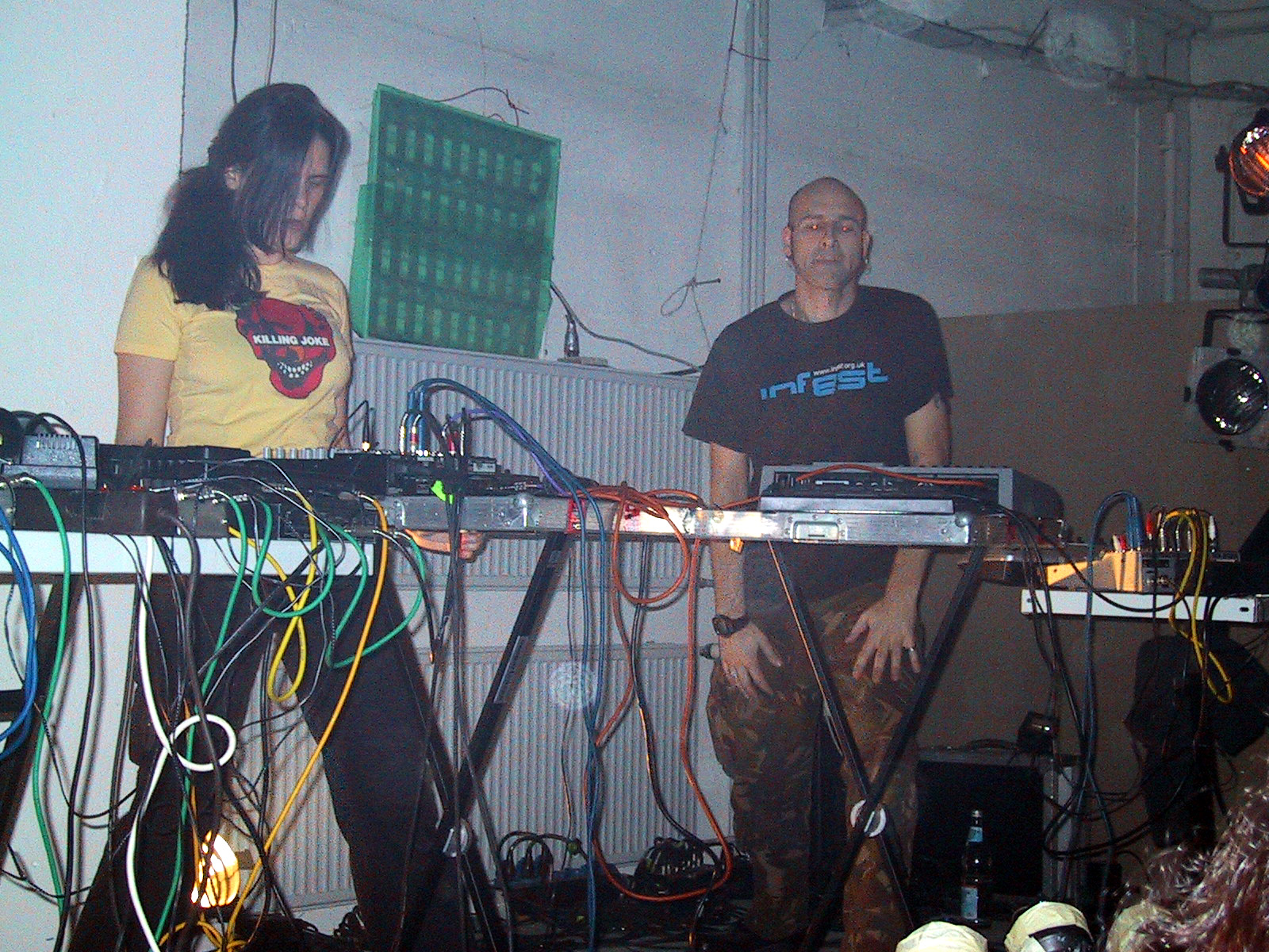 Die deutsche Musikgruppe MORGENSTERN bei einem Auftritt auf dem IWTBF-Festival : The germany band MORGENSTERN at the IWTBF-Festival Source: own work Date: Dez, 2003, Berlin, Germany Author: Maschinenjunge Licence: GFDL, cc-by 3.0